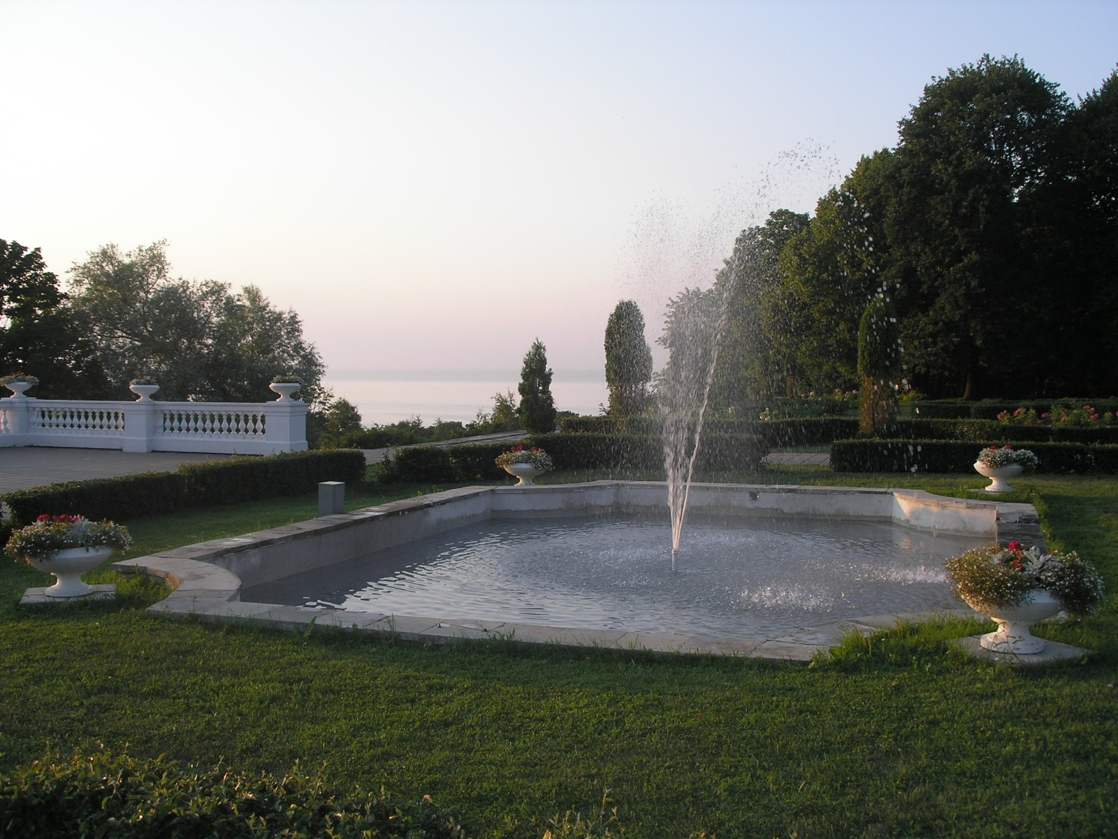 Purskkaev Toila-Oru pargis.